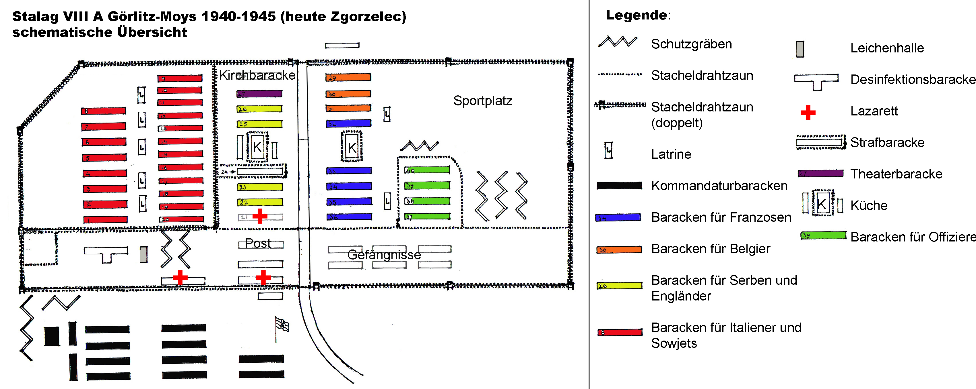 schematische Übersicht Stalag VIII A [überarbeitet 2013 richrockt/MMM]